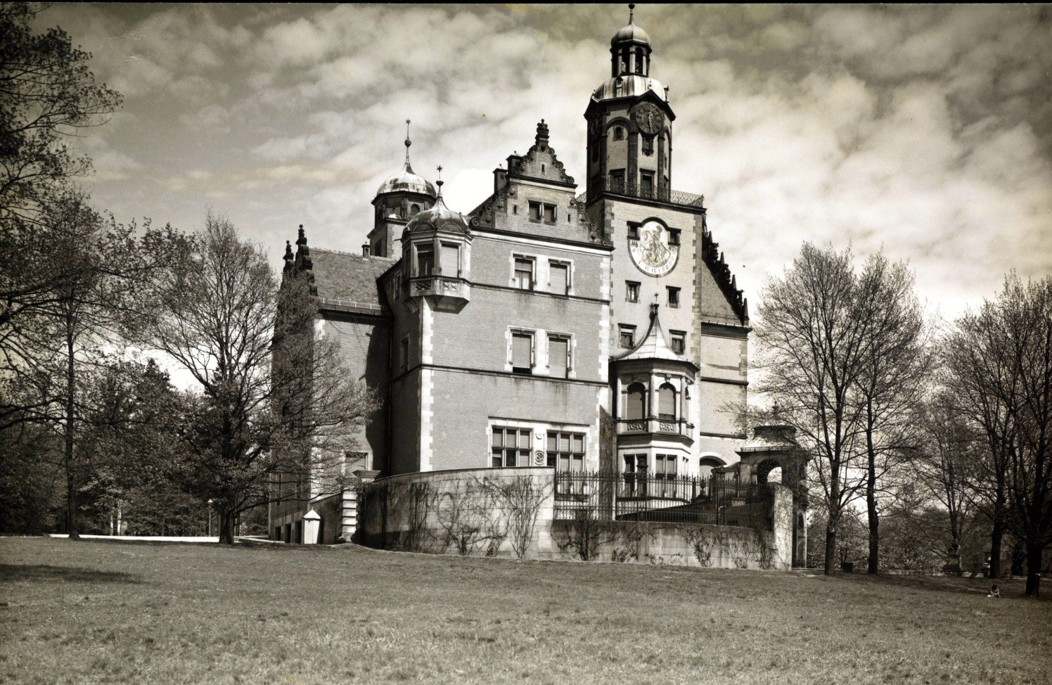 Pałac (zamek) w Reptach, zdjęcie z l. 1930-1939.